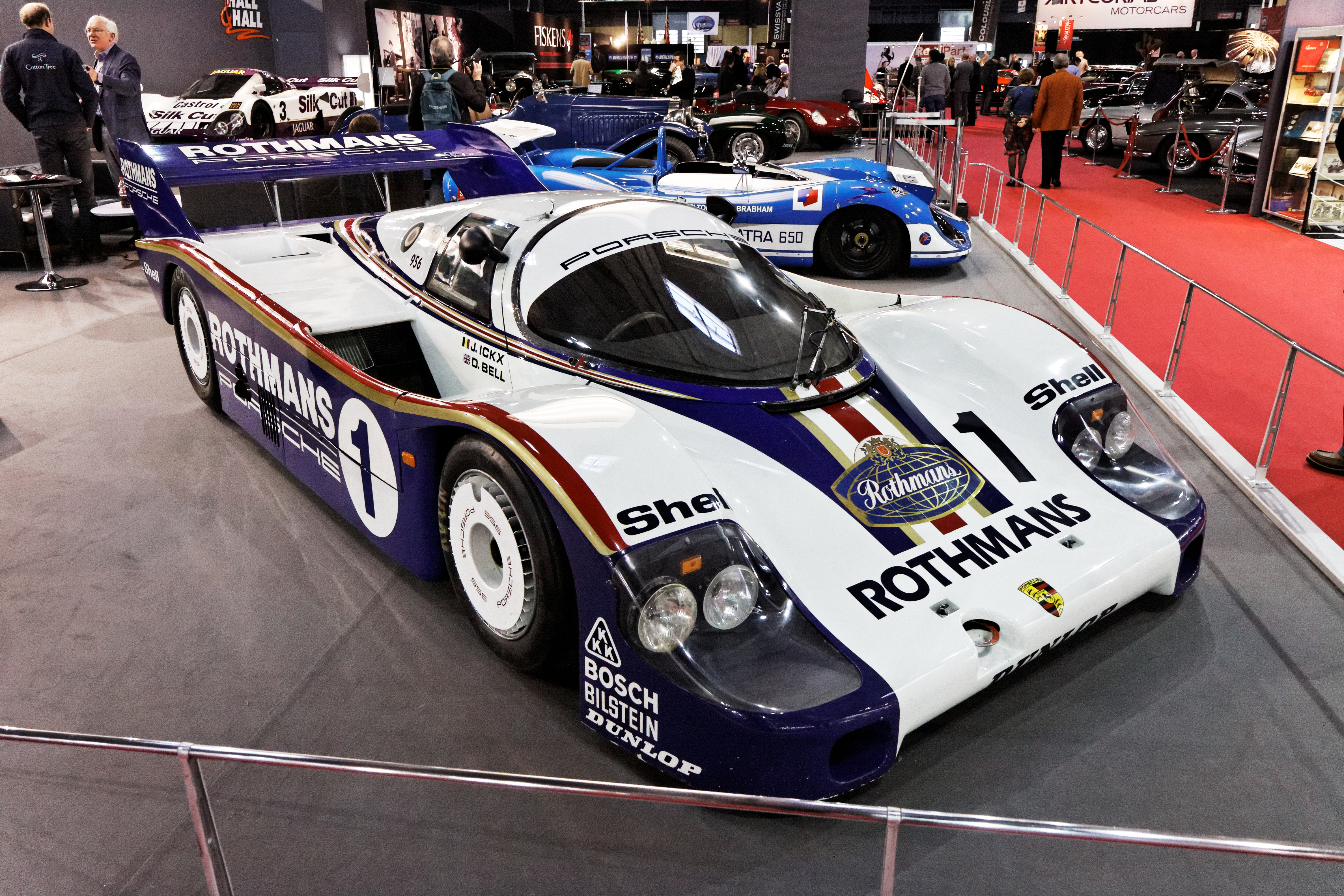 Une Porsche 956 présentée lors du salon Retromobile 2013.